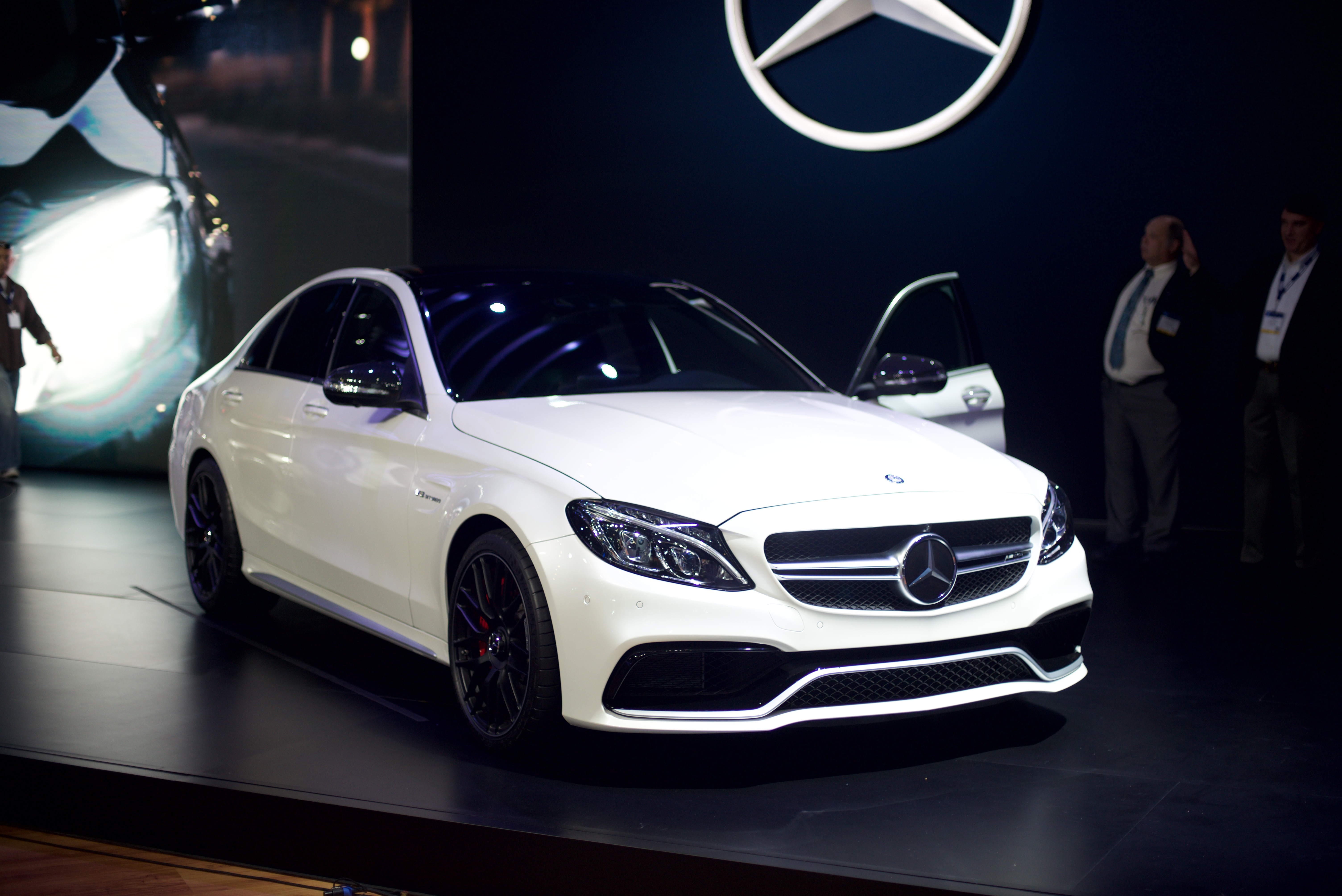 SLY_5706